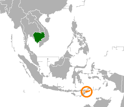 Localization of Cambodia and East Timor